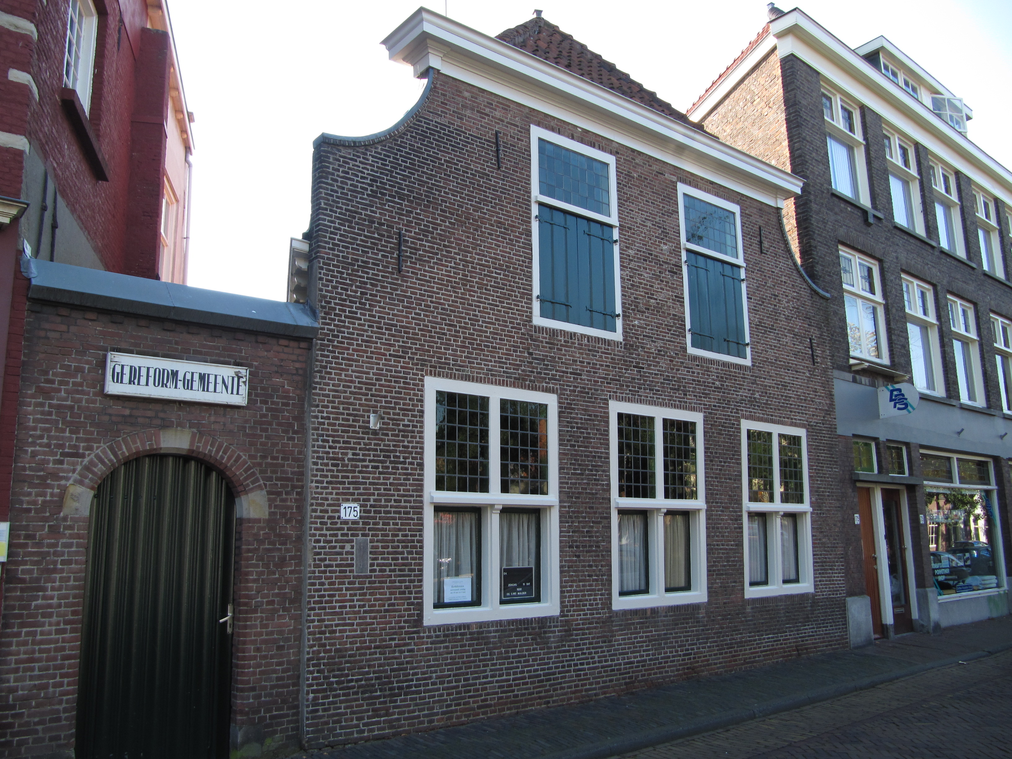 Kerkgebouw Gereformeerde Gemeente Oosteinde 175, Delft